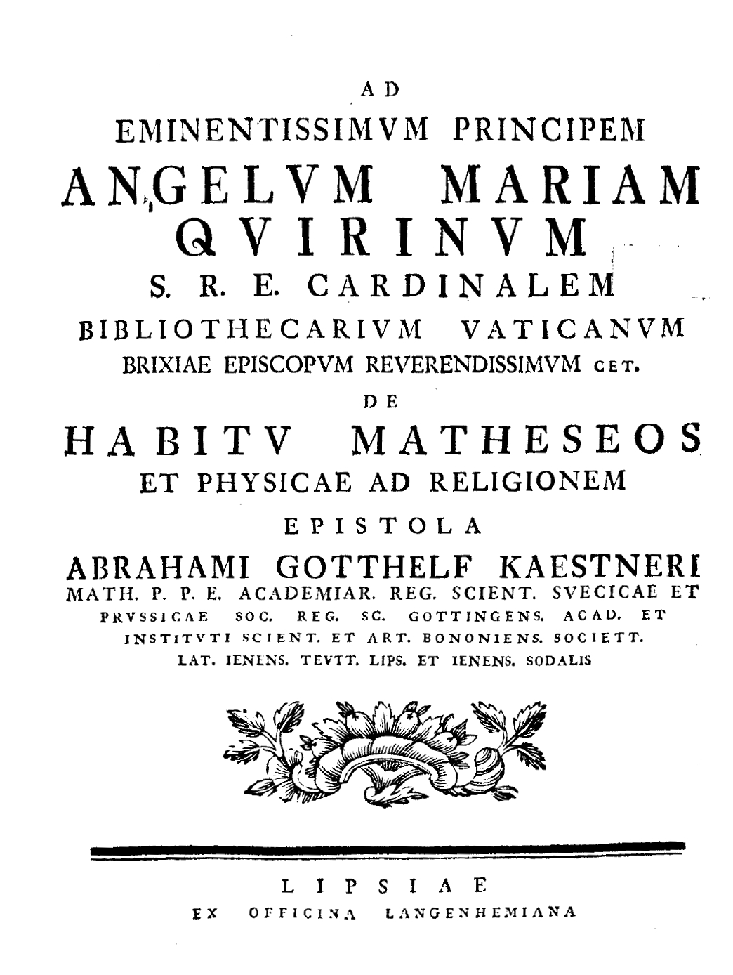 Frontespizio